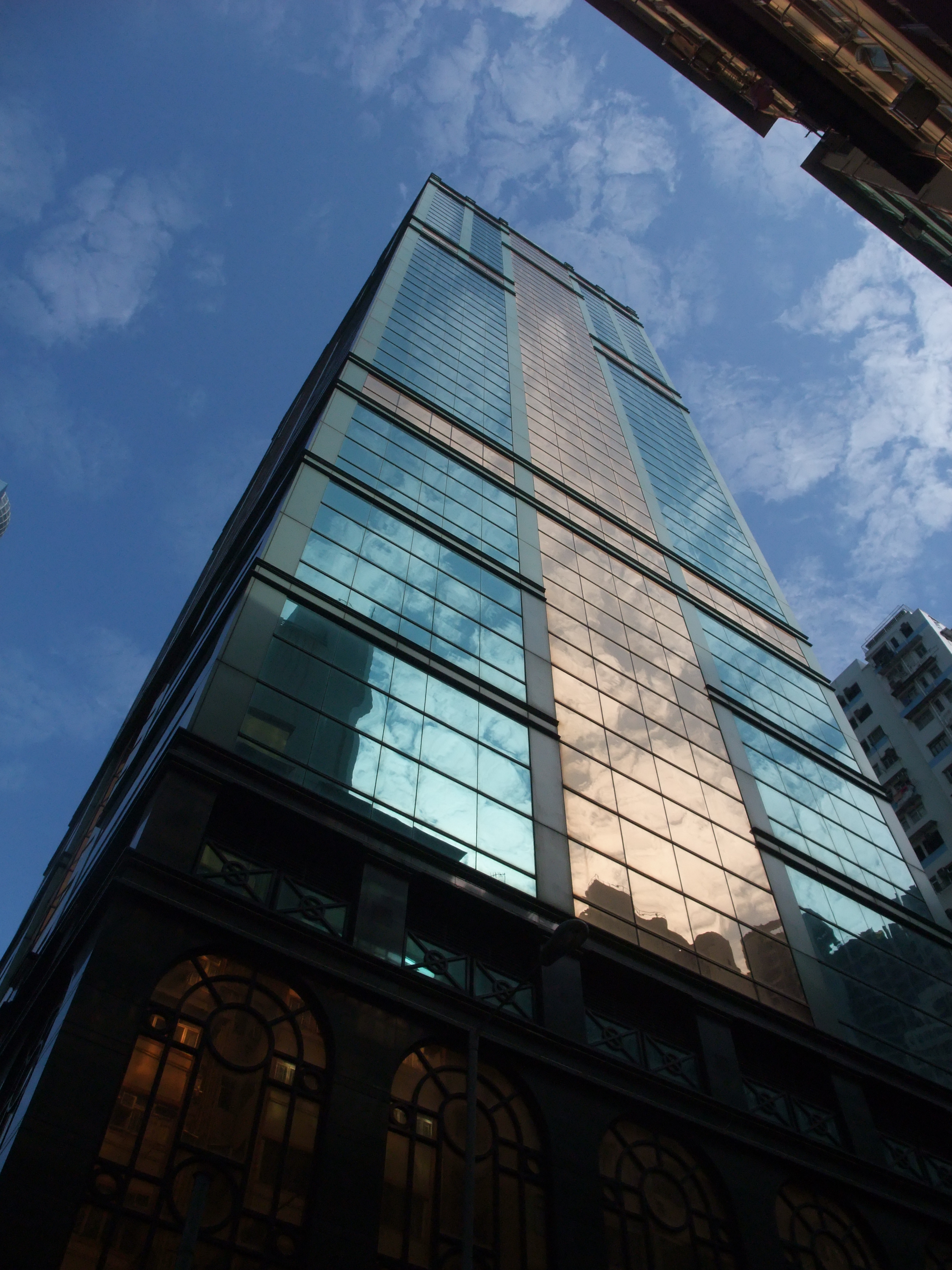 Photo of Ramada Hong Kong Hotel